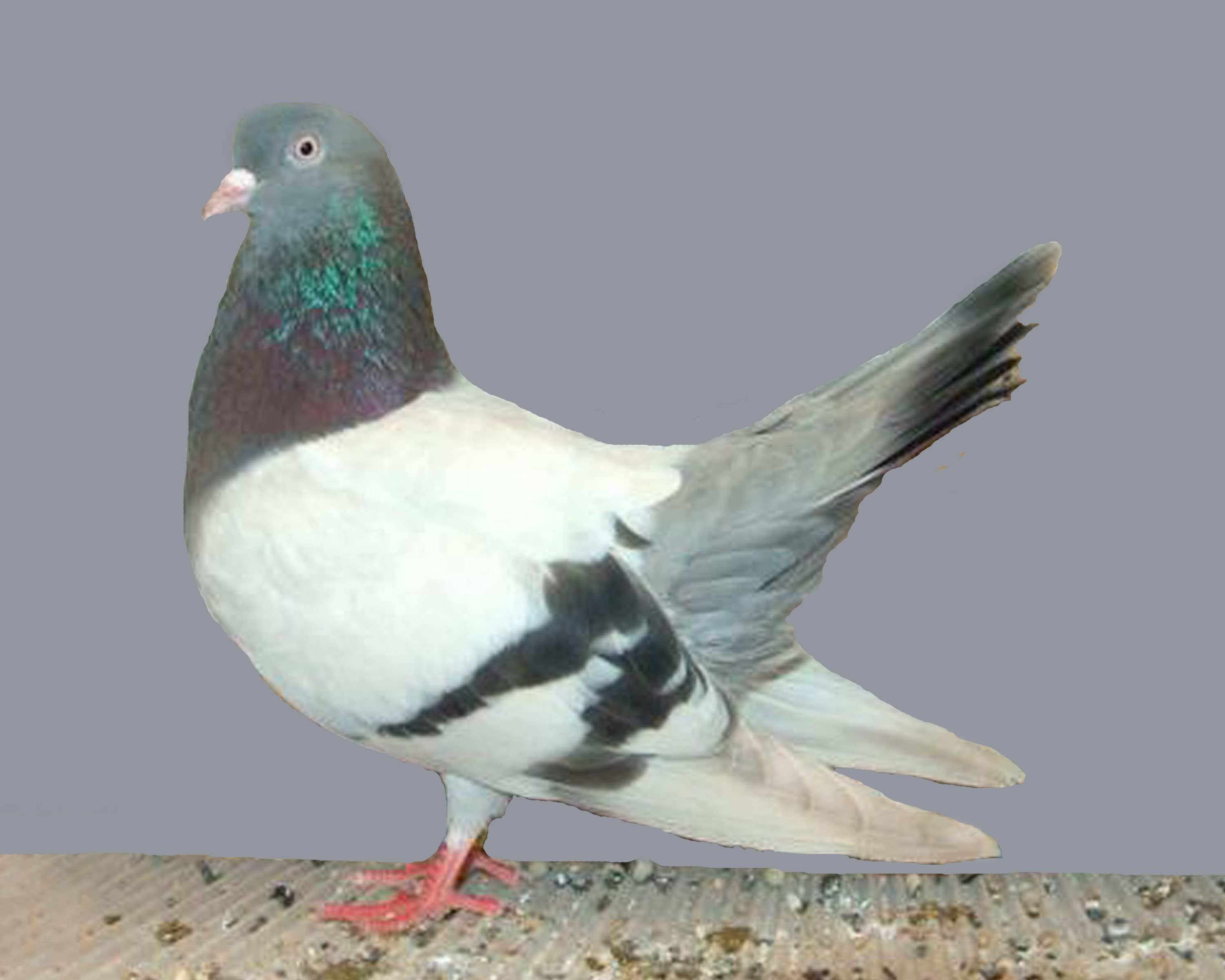 Oriental Roller (Blue Bar)